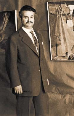 Retrato de Antonio Gómez Cano realizado en una de sus exposiciones.